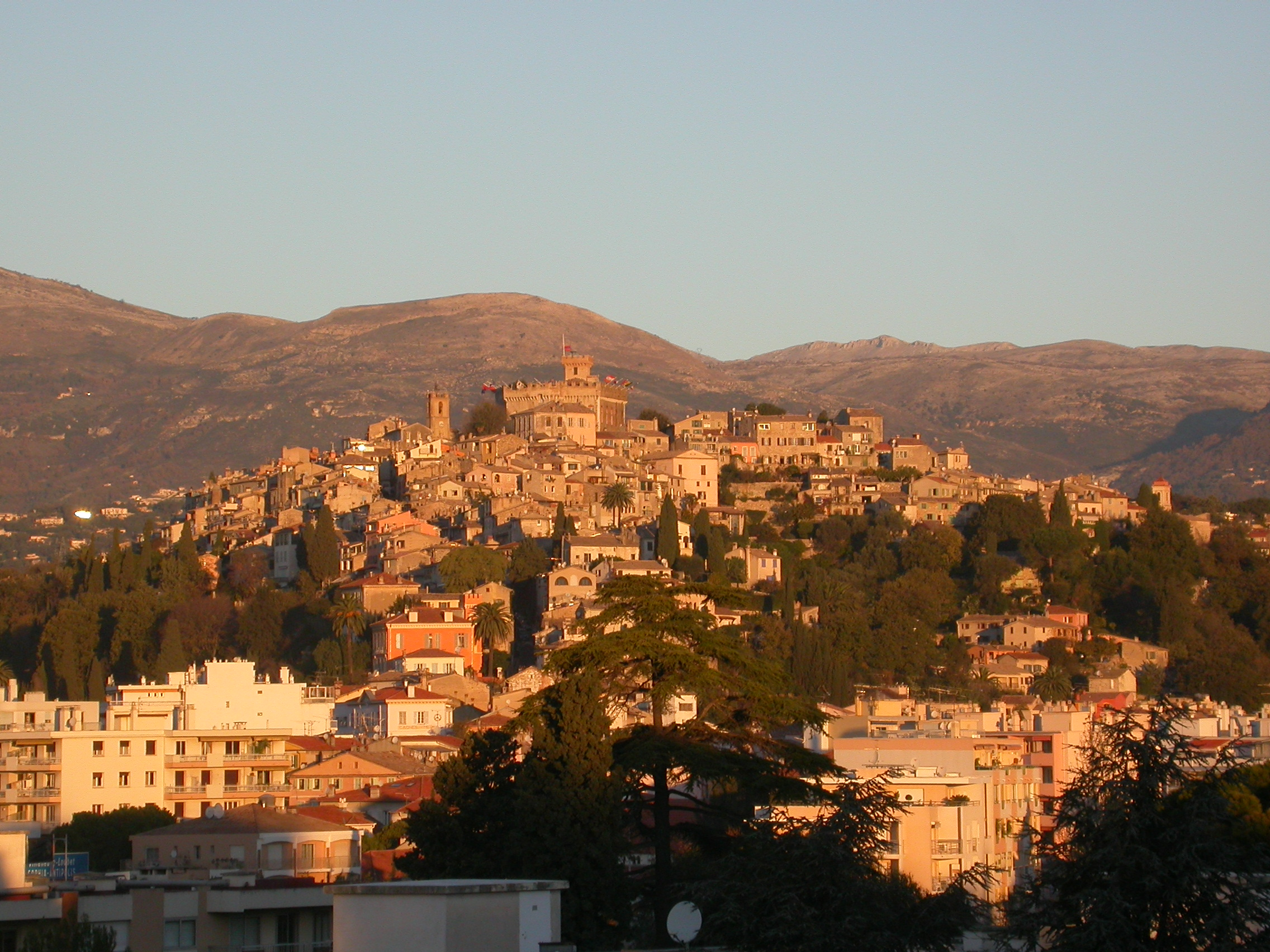 château de Cagnes-sur-Mer